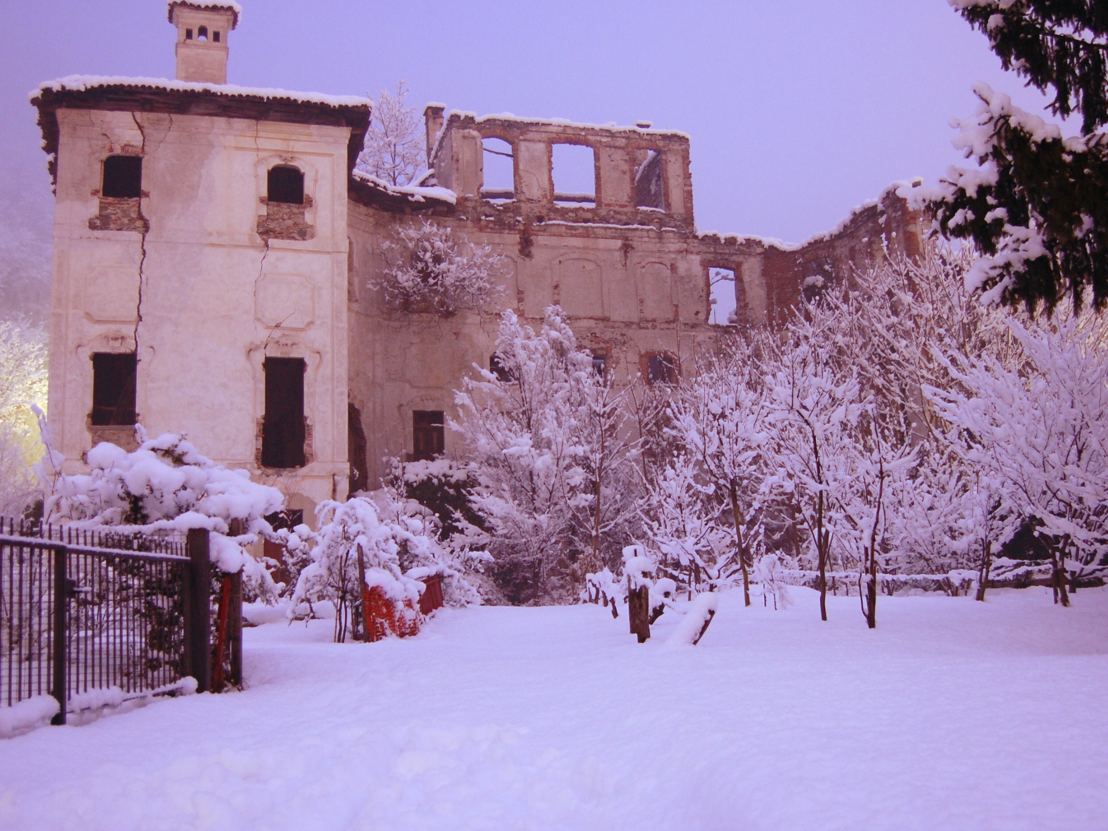 fotografia invernale facciata sud villa giulini a sorico